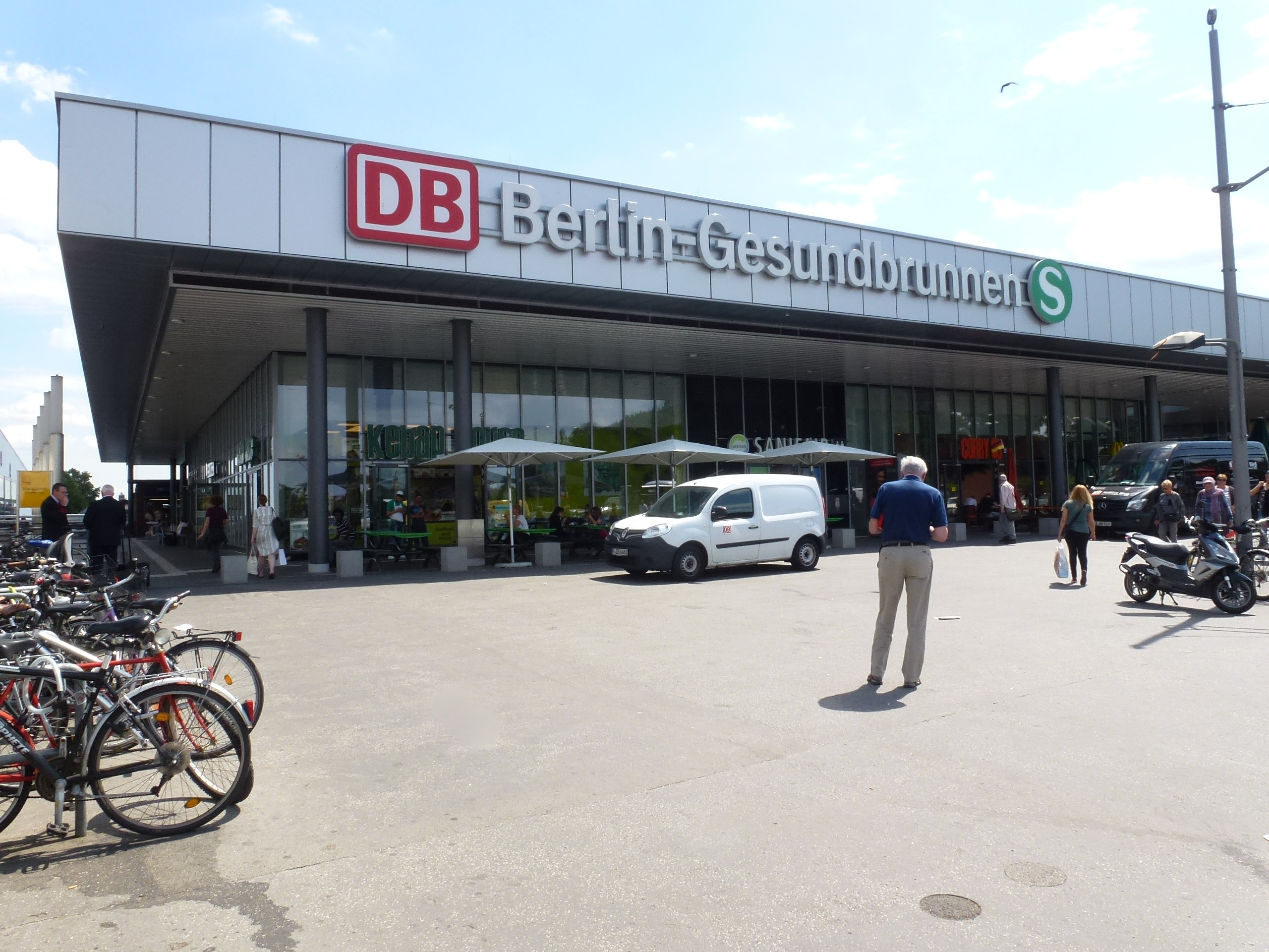 Berlin-Gesundbrunnen Bahnhofsgebäude